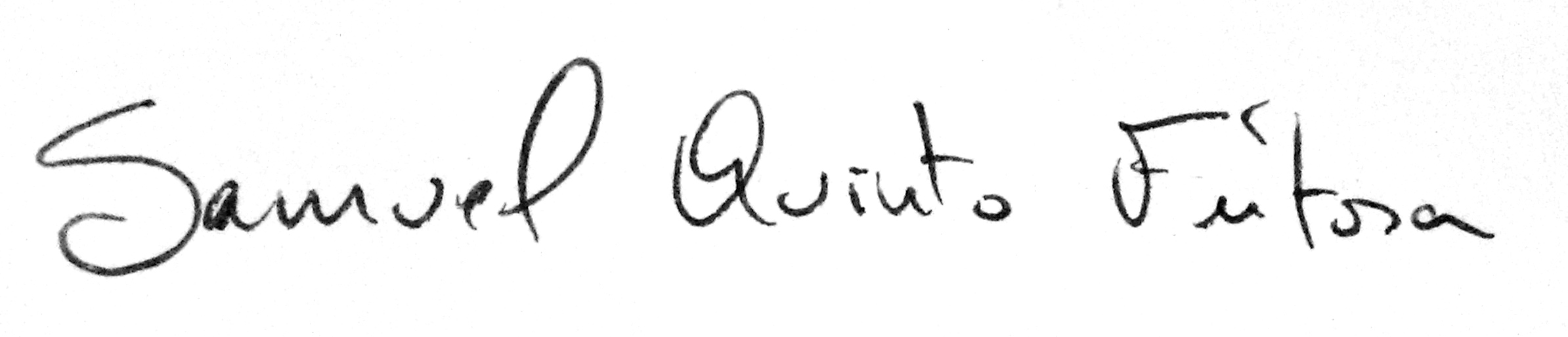 Assinatura digital Samuel Quinto